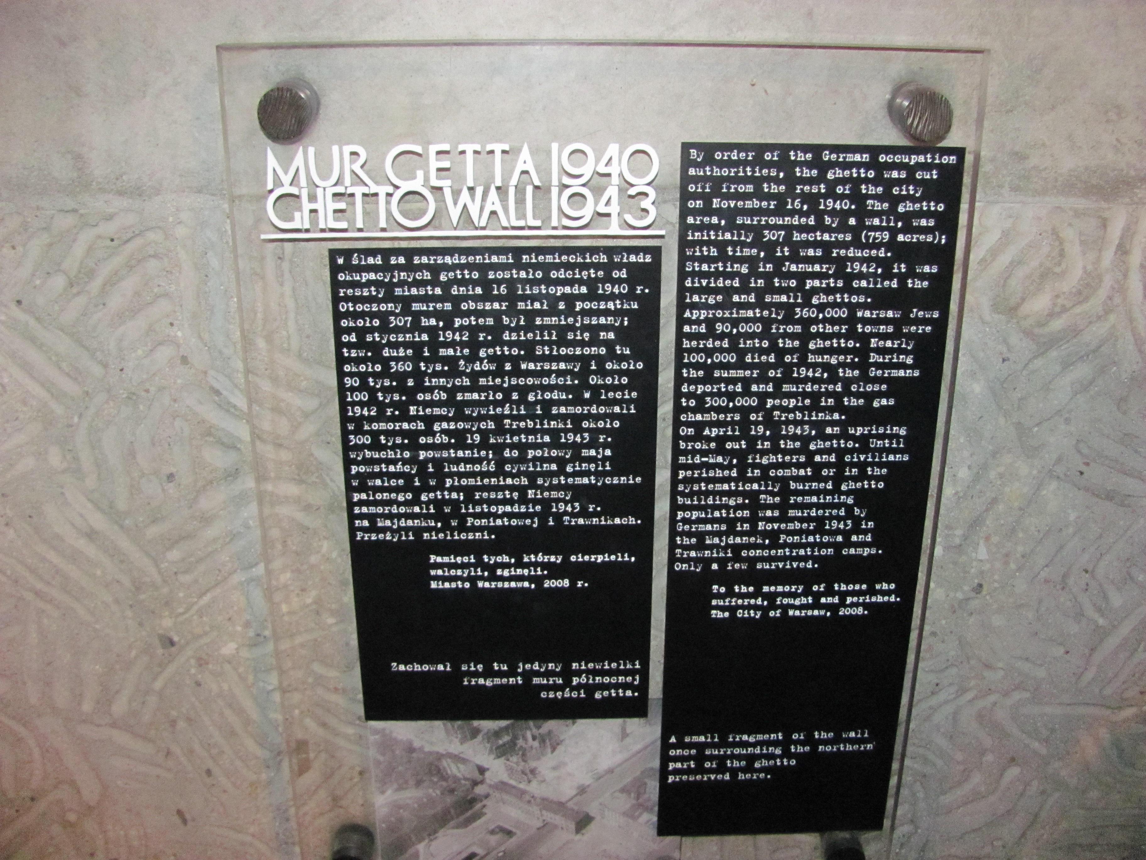 Placa en un resto del muro del guetto de Varsovia